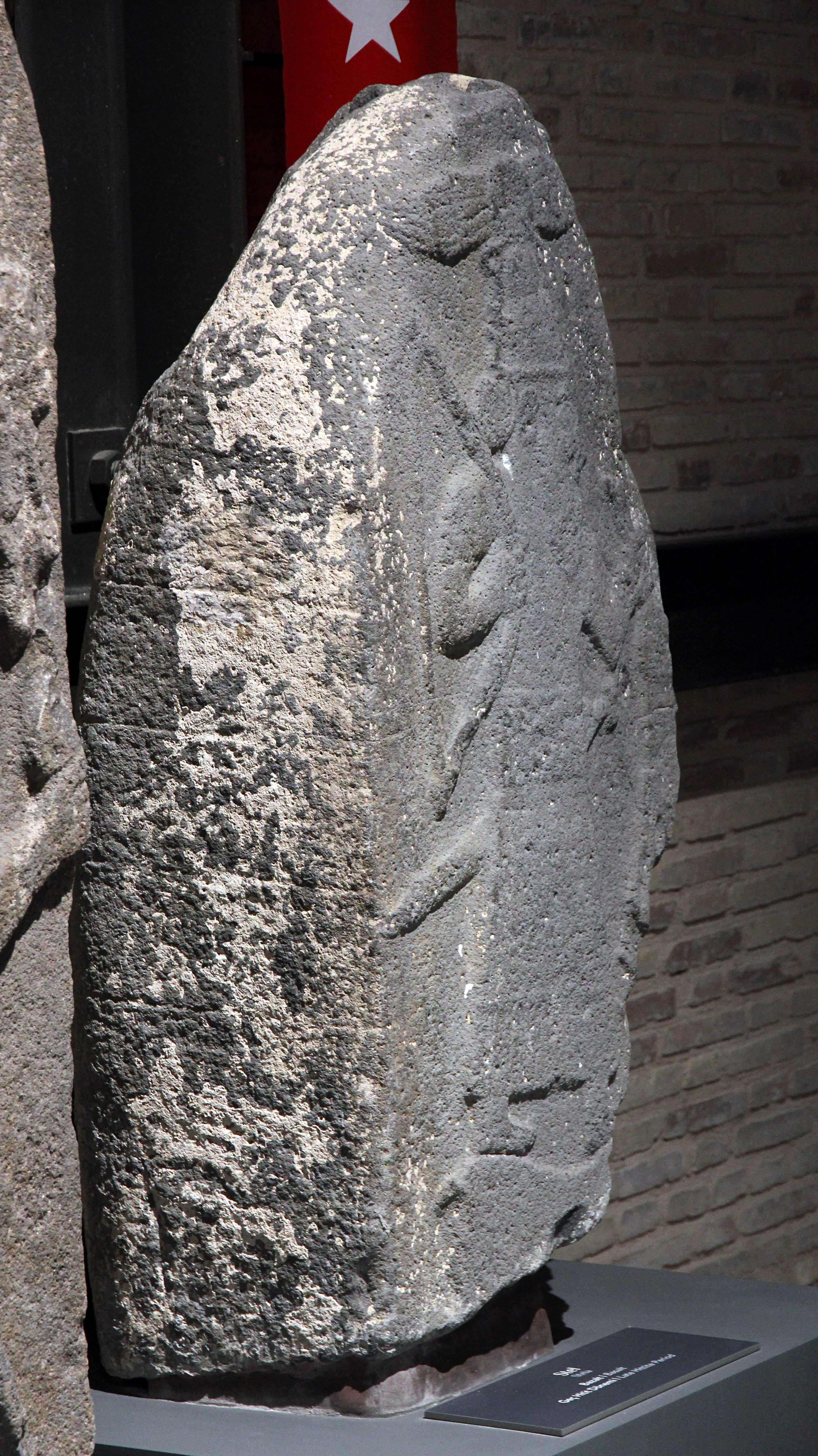 Archäologisches Museum Adana, Südtürkei, späthethitische Stele eines Schutzgottes aus Hacıbebekli